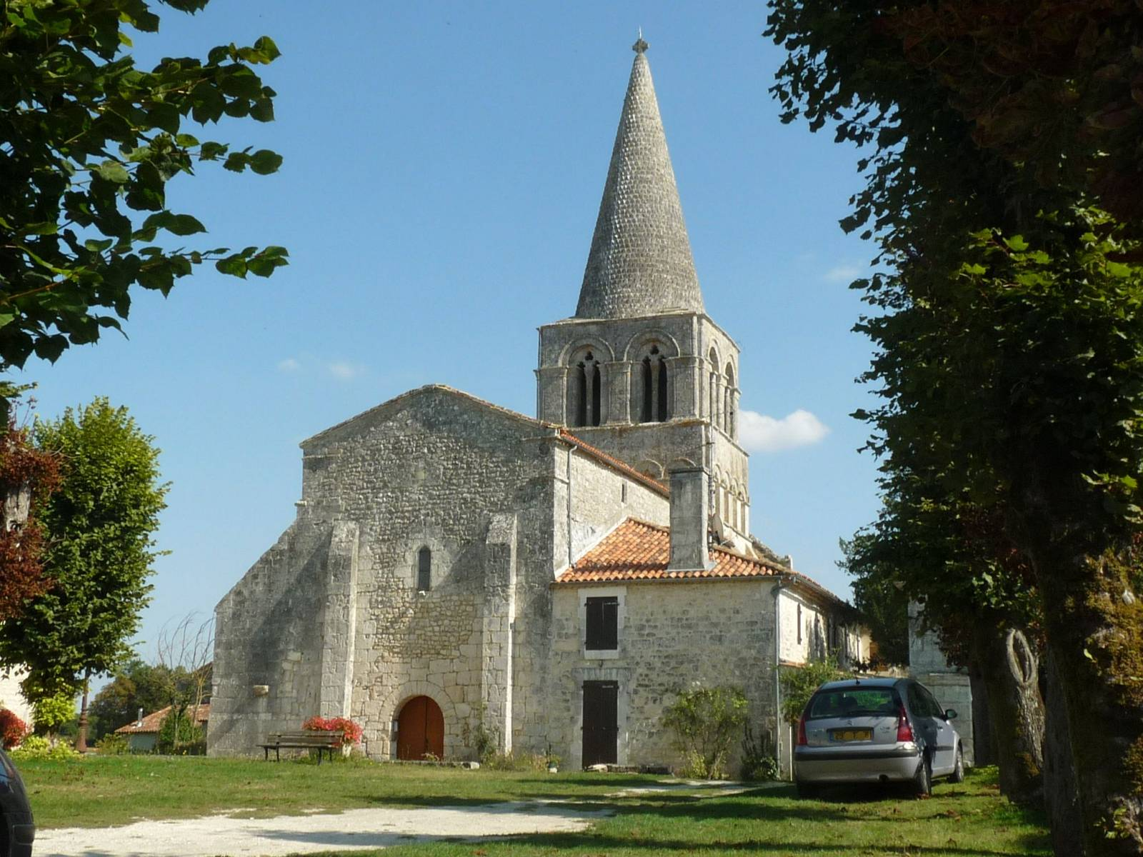 église de St-Estèphe (16), France